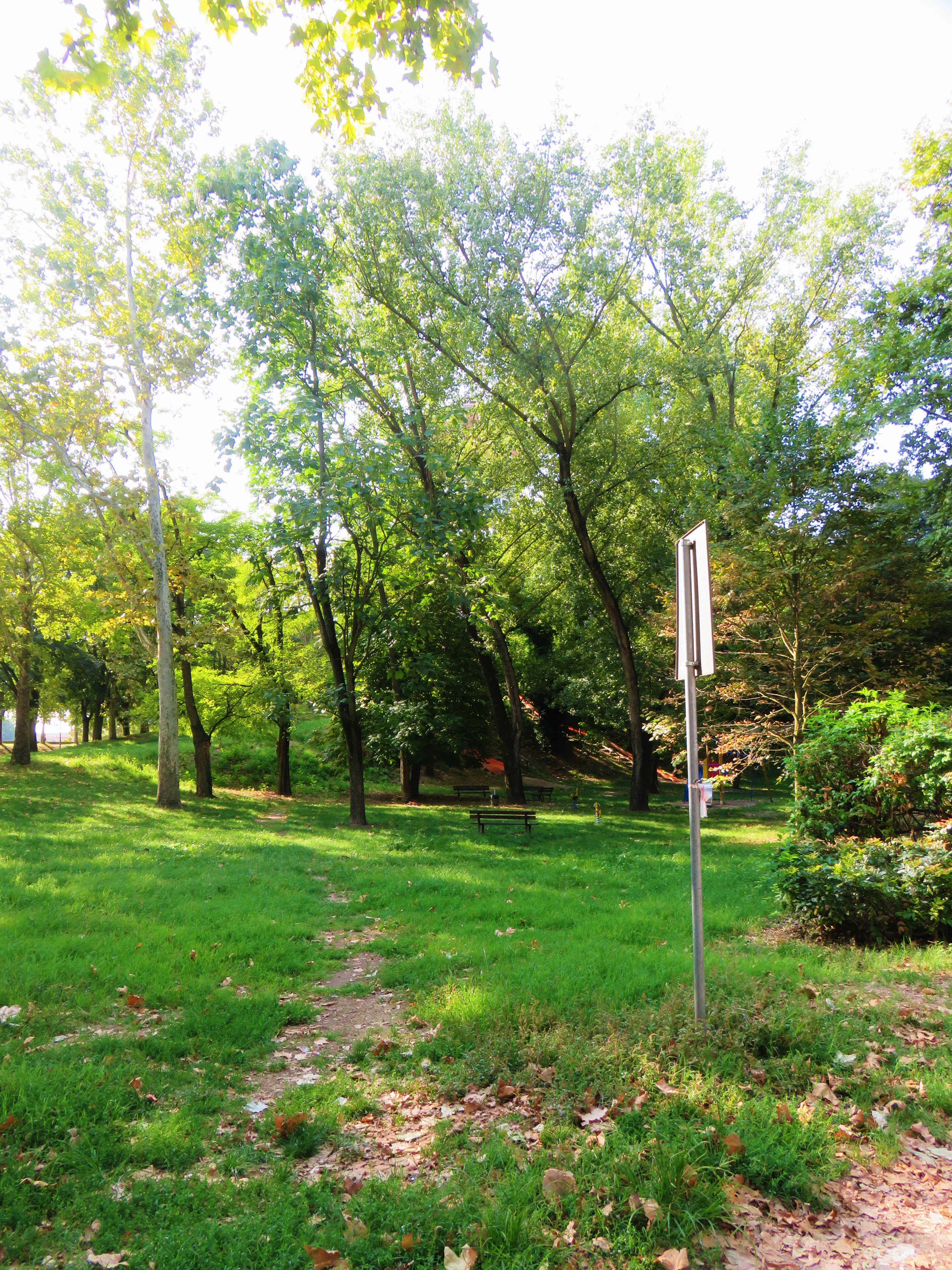 Il parco del Montagnone, passeggiate e vialetti